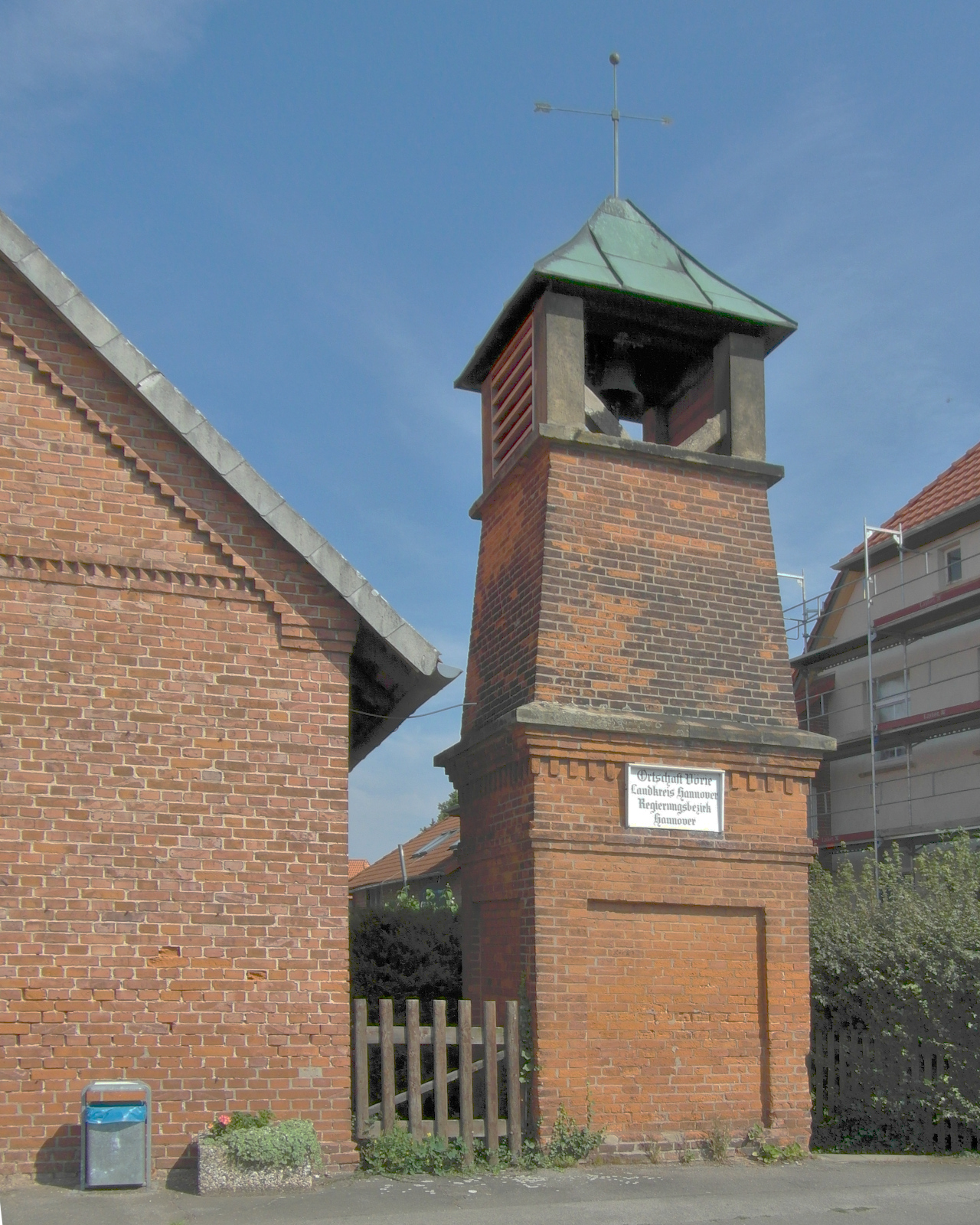 Der denkmalgeschützte Feuerwehrturm Vörie im Juli 2014. Das Kabel zwischen Turm und Nachbargebäude diente der Stromversorgung des Glockenläutemotors